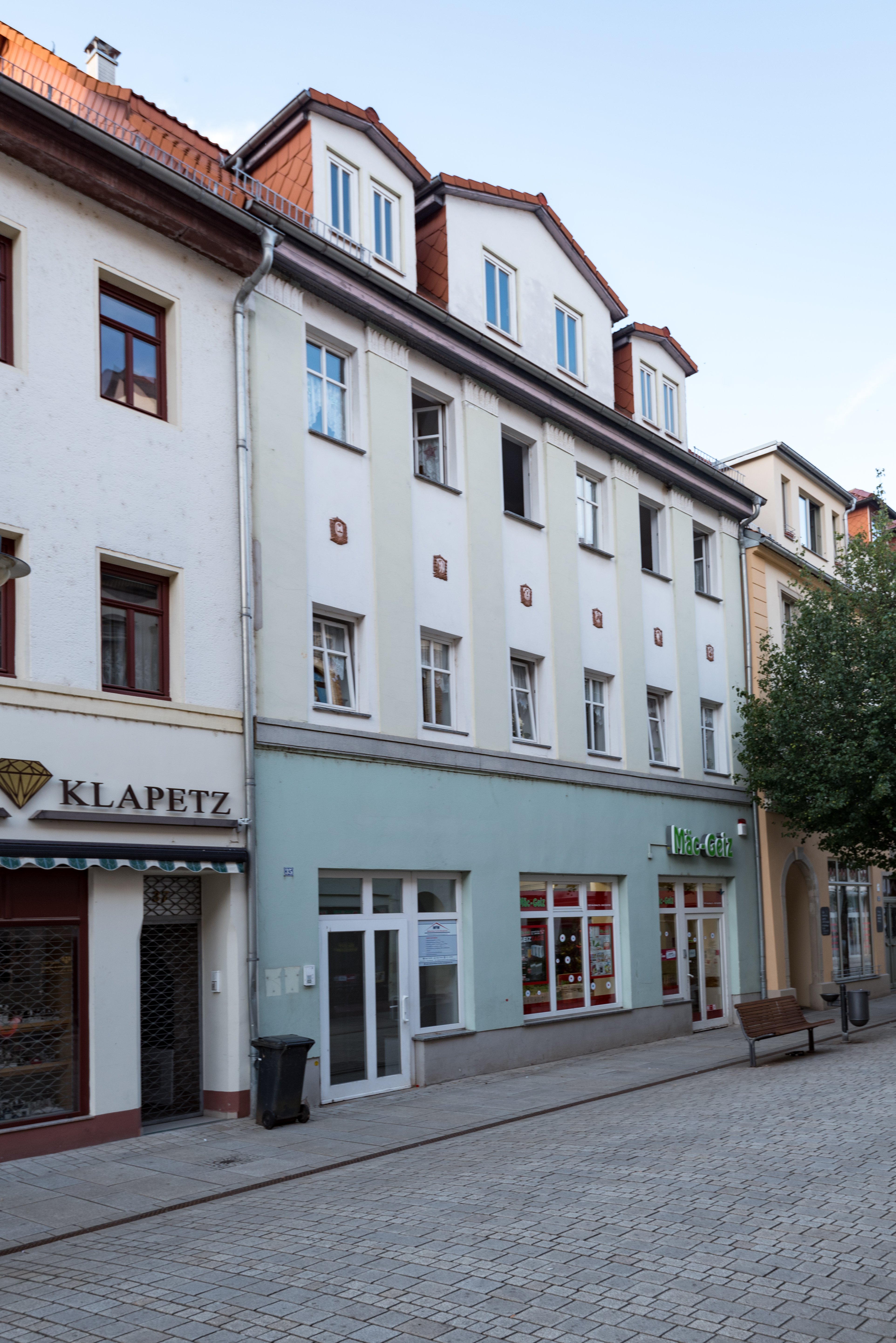 Weißenfels, Jüdenstraße 35